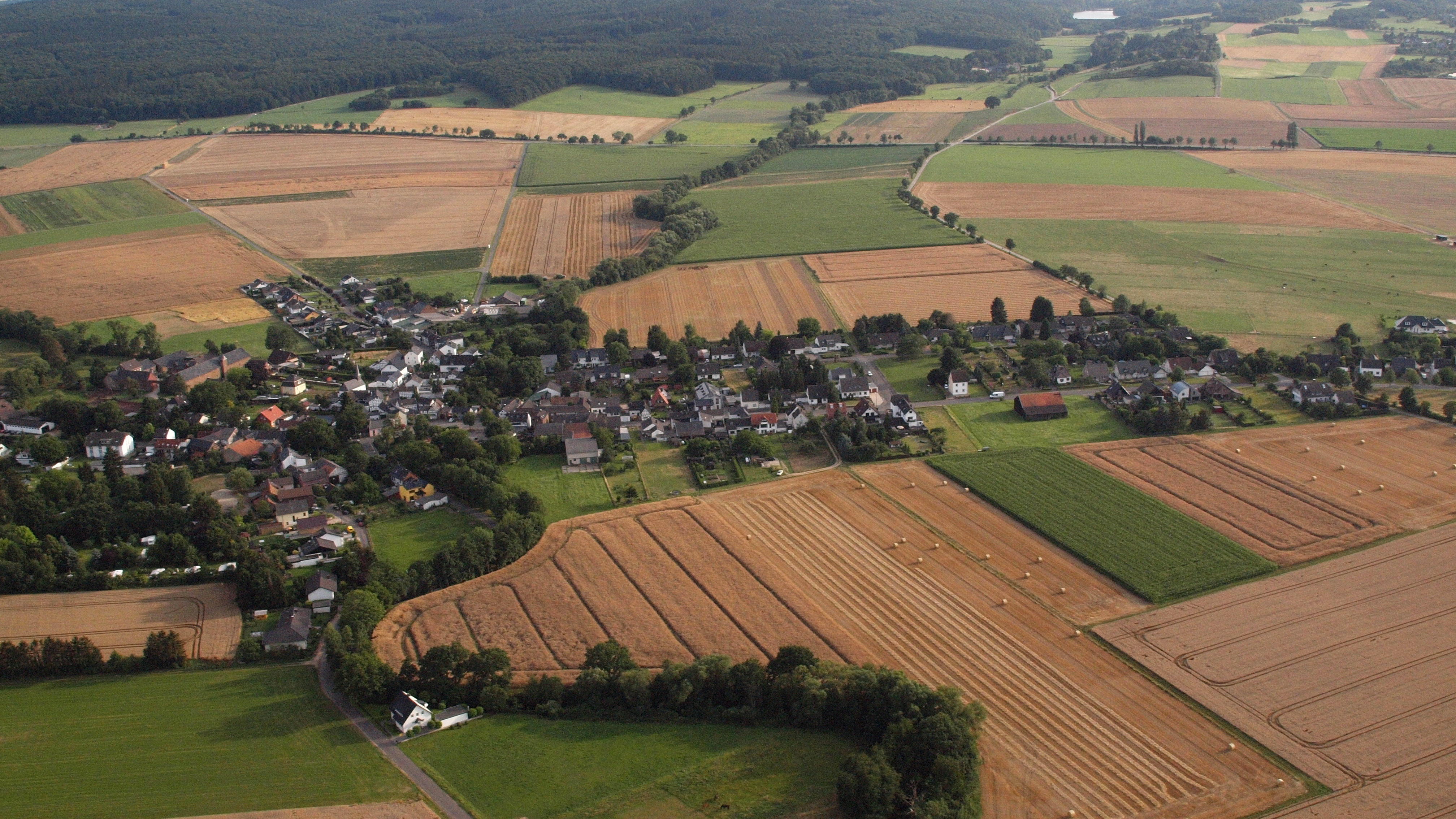 Schweinheim, Luftaufnahme (2015)